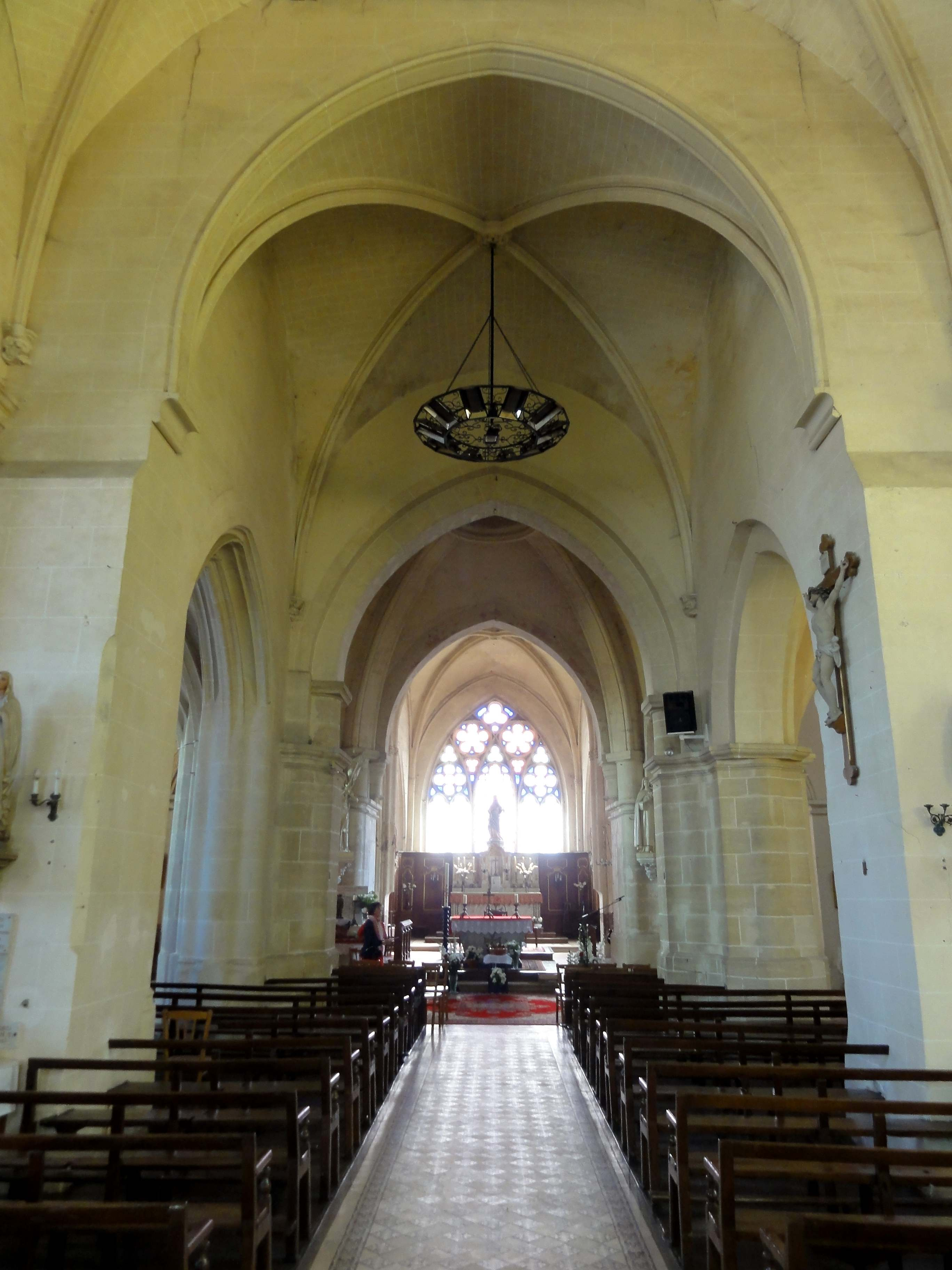 Intérieur de l'église Saint-Vaast de Nointel (voir titre).